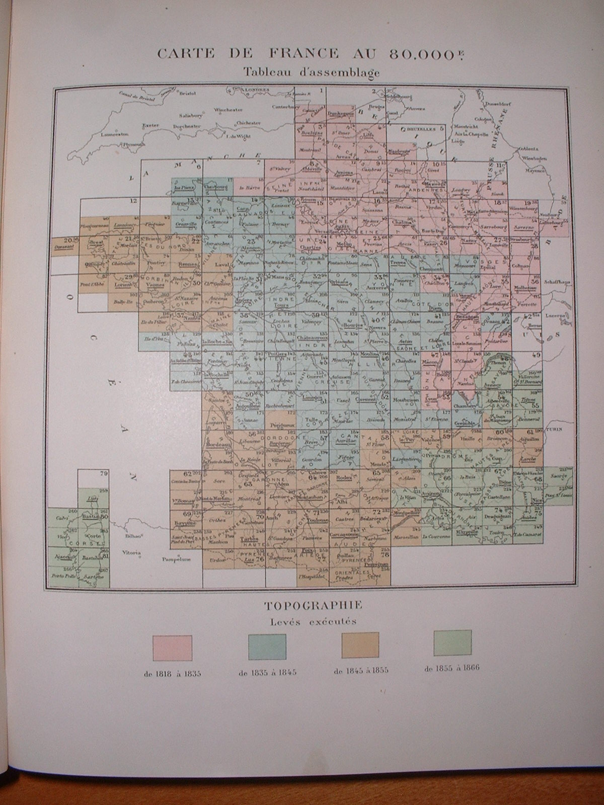 Année des levés des feuilles de la carte d'Etat-Major